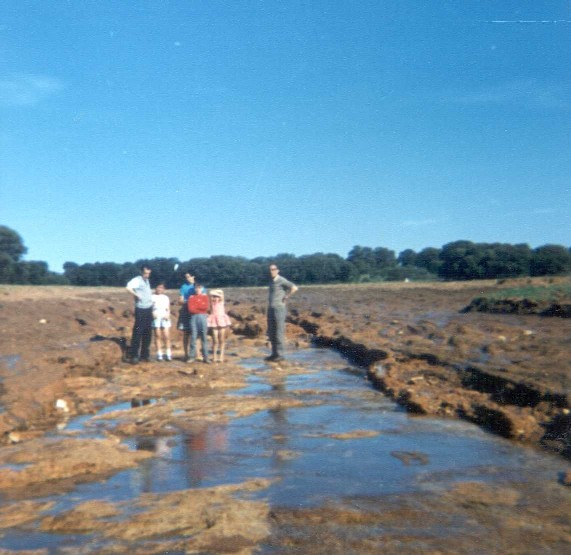 Imagen de la extrusión kárstica en la Cañada del Canutillo (Junio, 1971) Foto.- F.J. García Mariana.